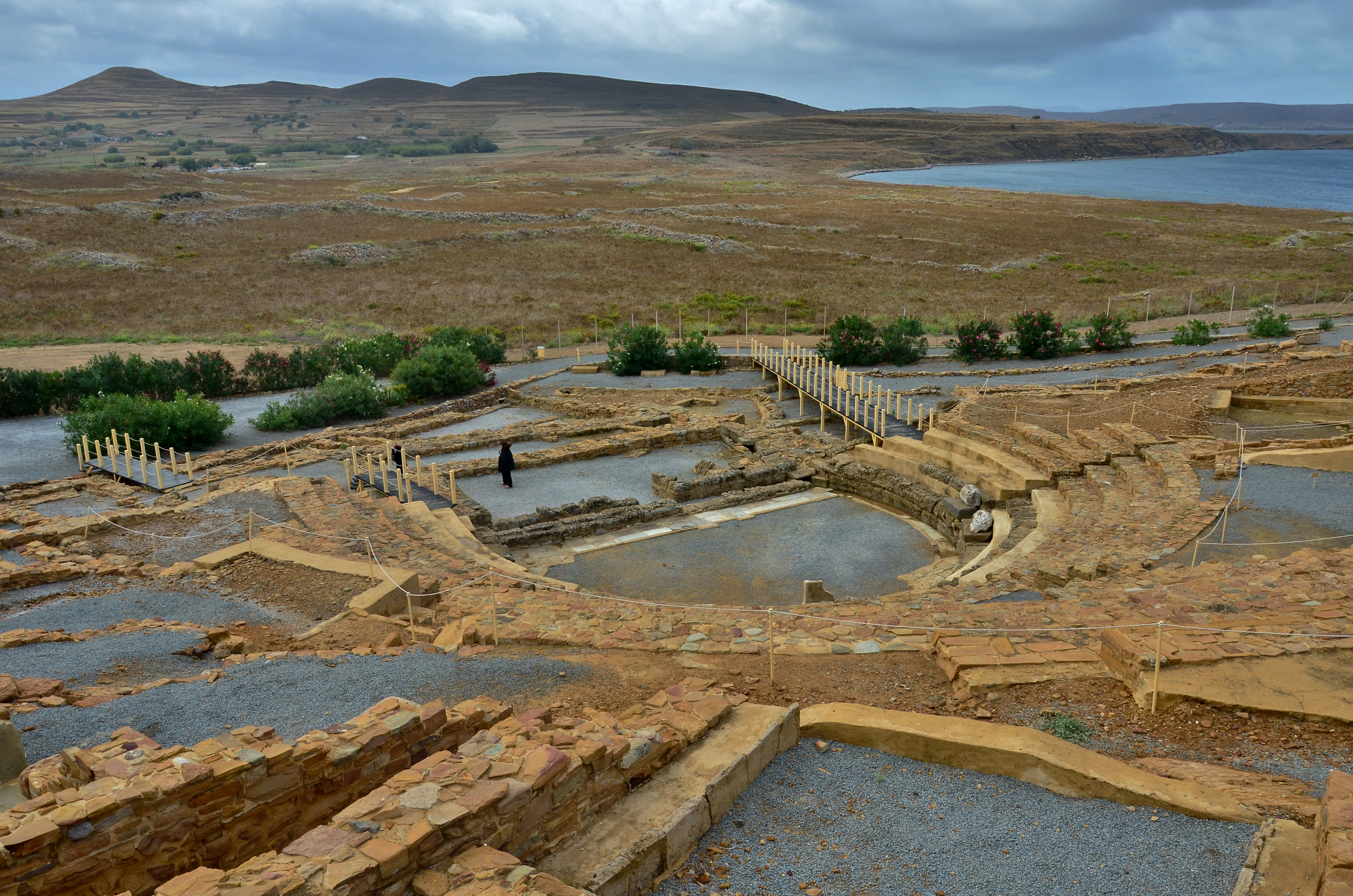 Ηφαιστία